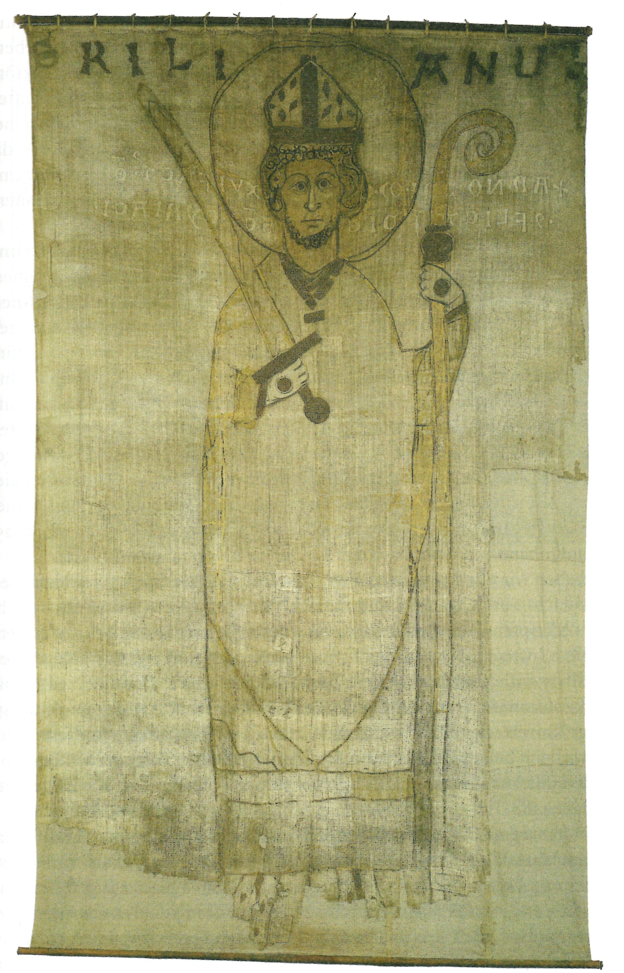 Das sogenannte Kiliansbanner, Feldzeichen in der Cyriakusschlacht 1266 für die Würzburger Truppen. Heute im Museum für Franken, Würzburg. Wahrscheinlich ältestes, erhaltenes Feldzeichen Deutschlands.